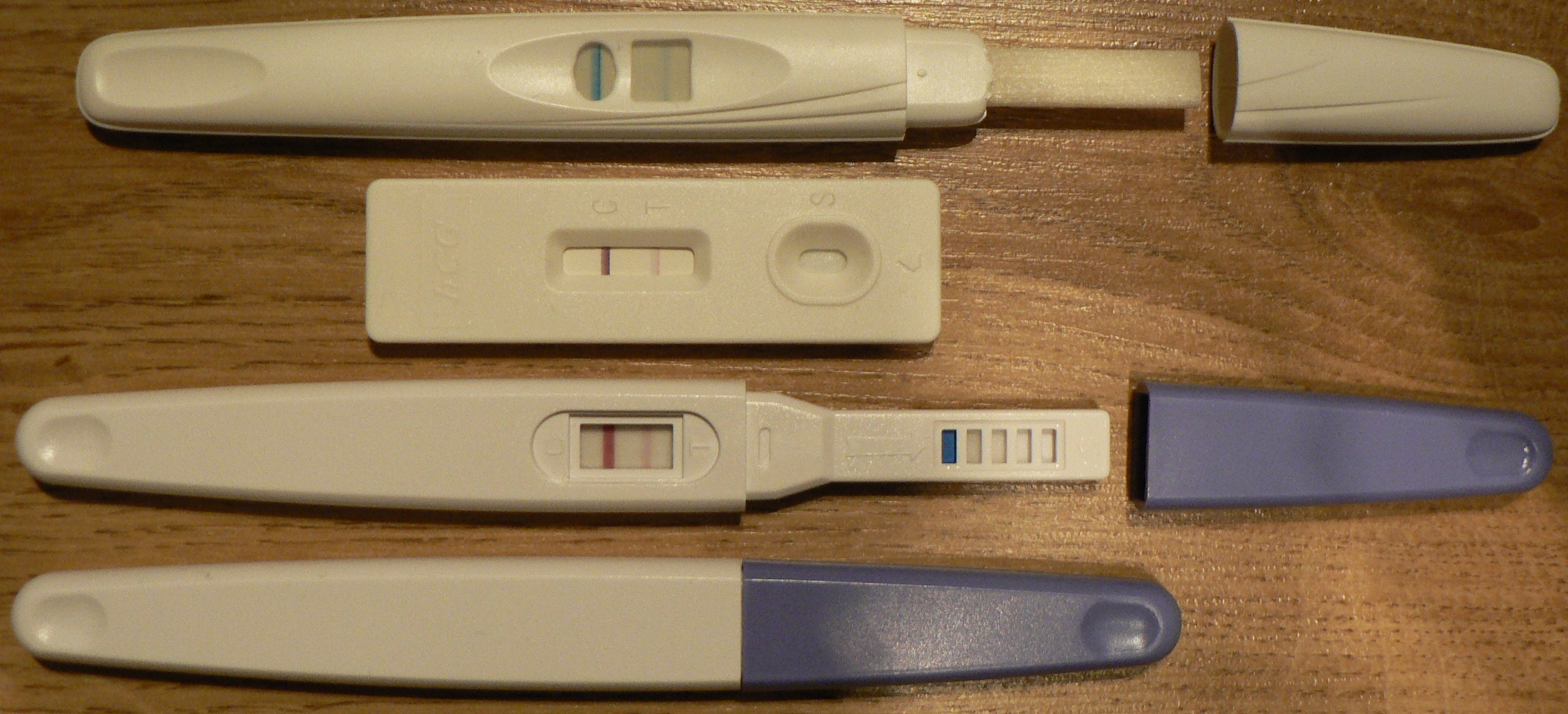 pregnancy tests